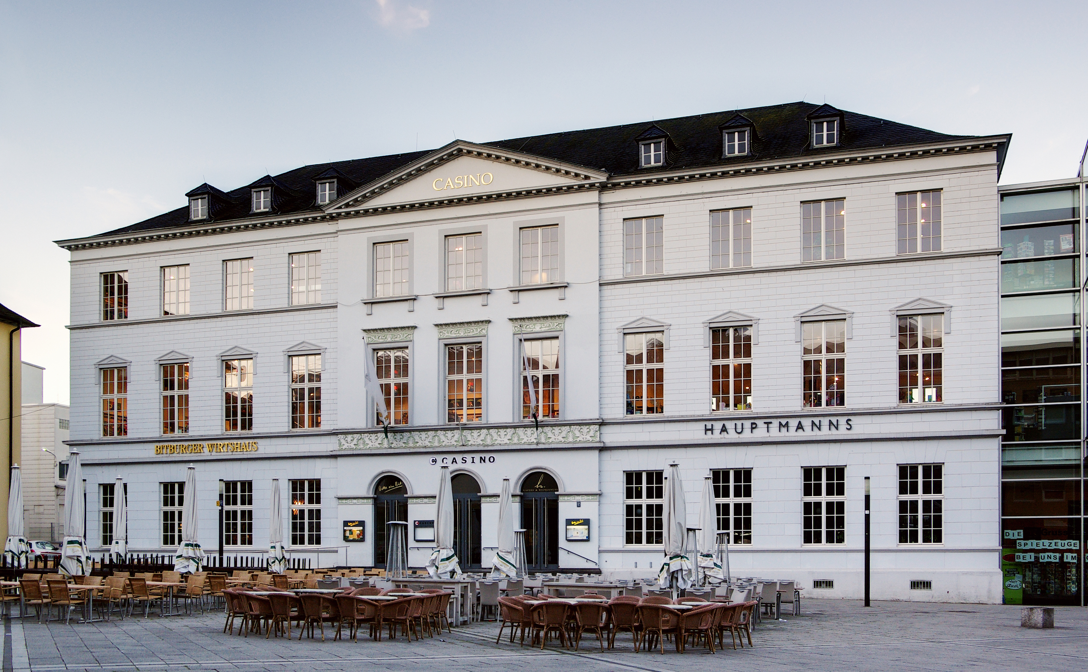 Kornmarkt 2: Casino; dreigeschossiger klassizistischer Walmdachbau mit schlossartiger Platzfront, 1824/25, Architekt Johann Georg Wolff